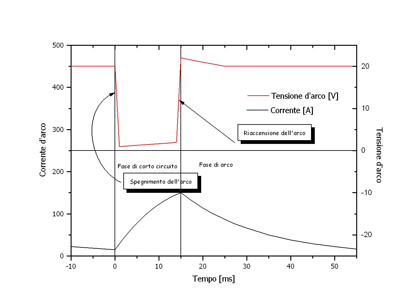 see below